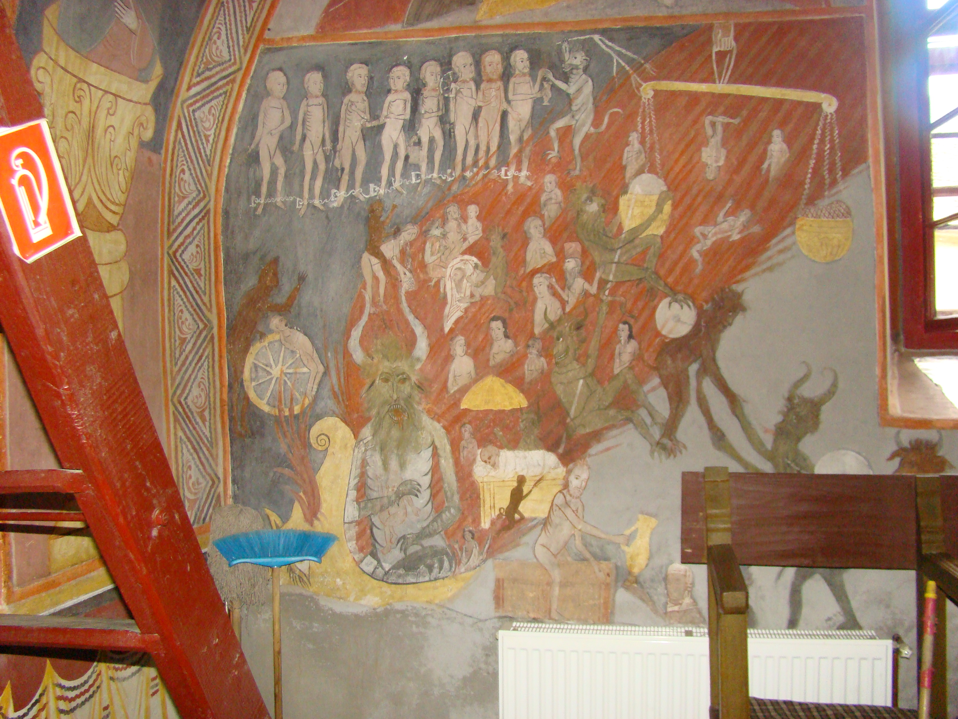 Biserica "Naşterea Domnului" , sat SĂRATA; comuna PORUMBACU DE JOS; pronaos - Judecata de Apoi